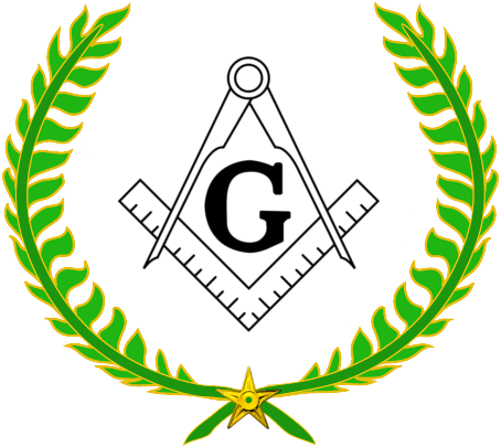 Recompense pour les wikipédiens ayant participé au projet franc-maçonnerie